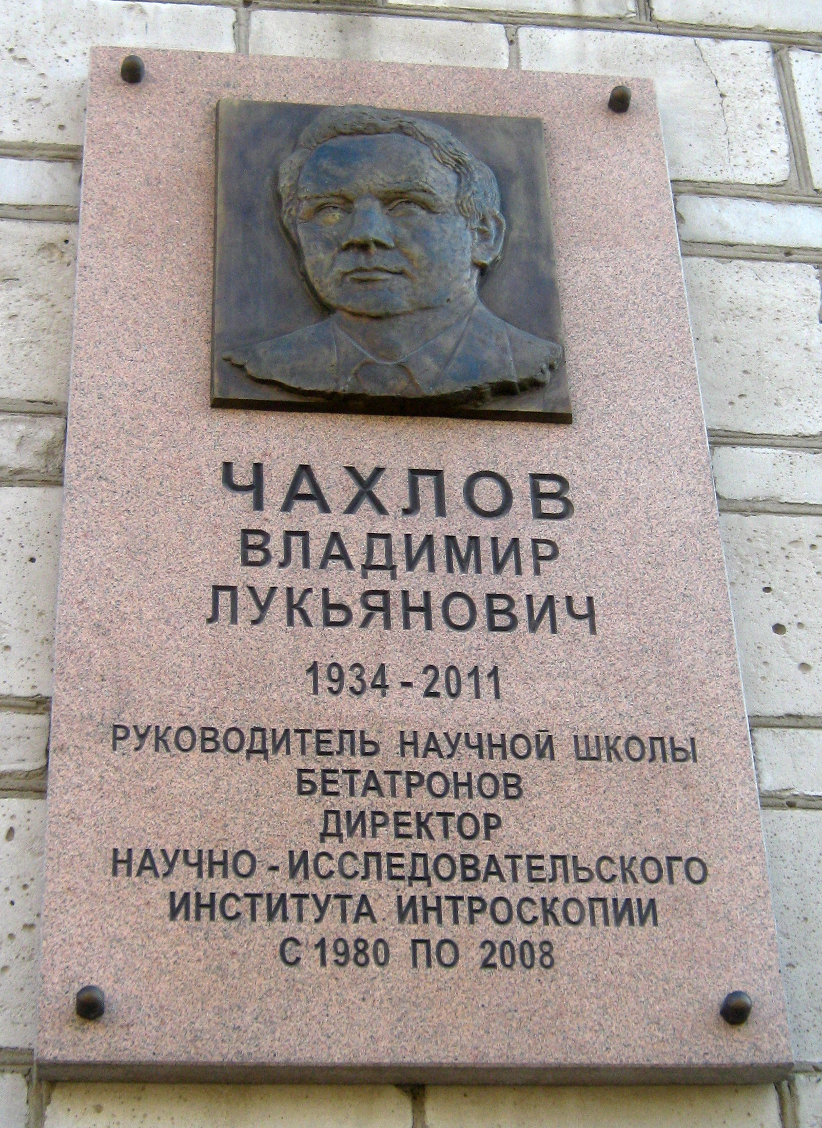 Савиных 7, Томск